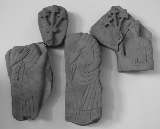 Tympanon z kostela Jana Křtitele v Oldříši-Podhradí. Lapidárium NM v Praze